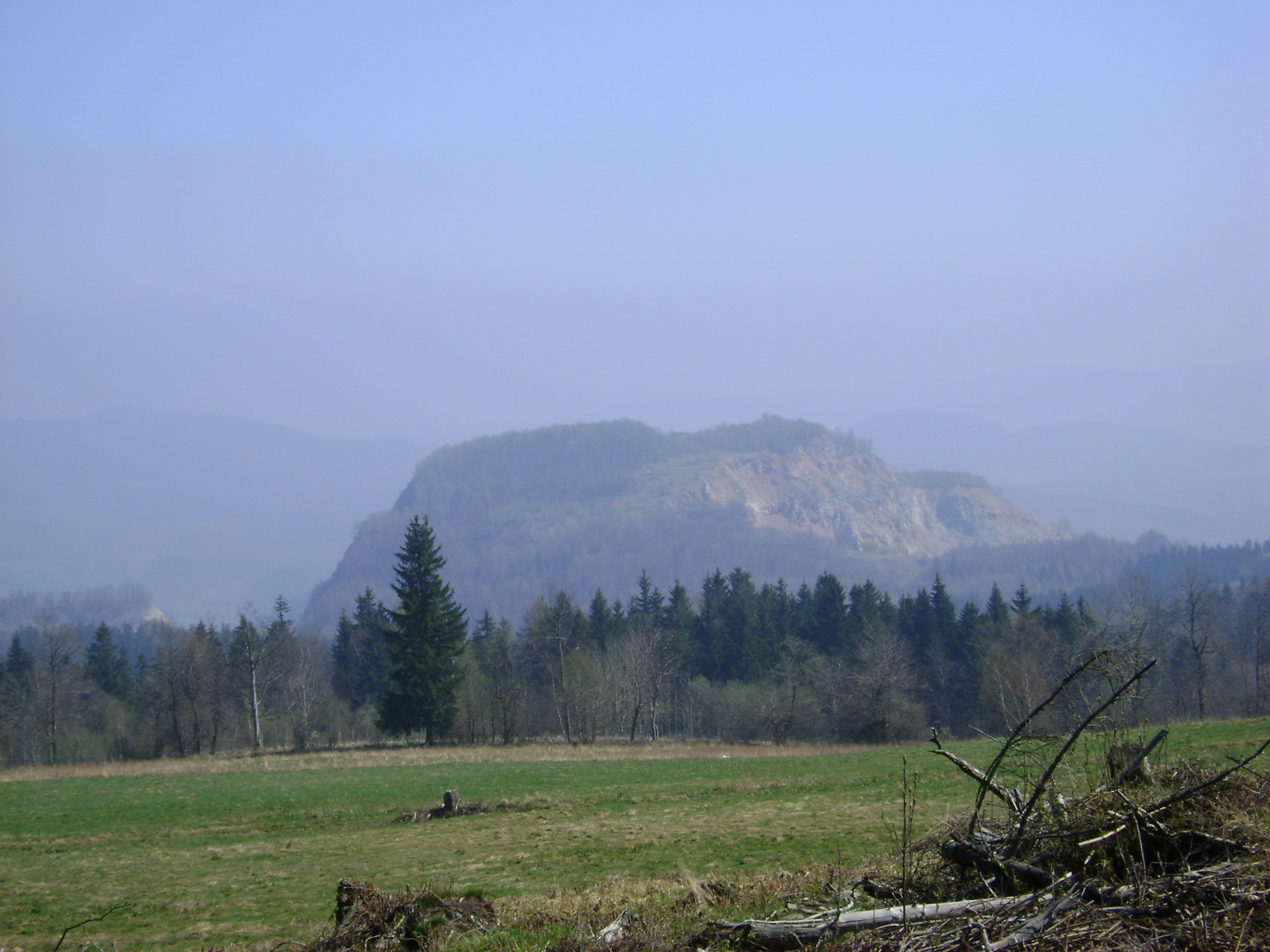 Połom - wzniesienie w południowo-zachodniej Polsce w Górach Kaczawskich (Sudety Zachodnie) woj. dolnośląskie. Widok na wzniesienie i kamieniołom Wocieszowskich Zakładów Wapiennych od strony zachodniej z podnóża Skopca